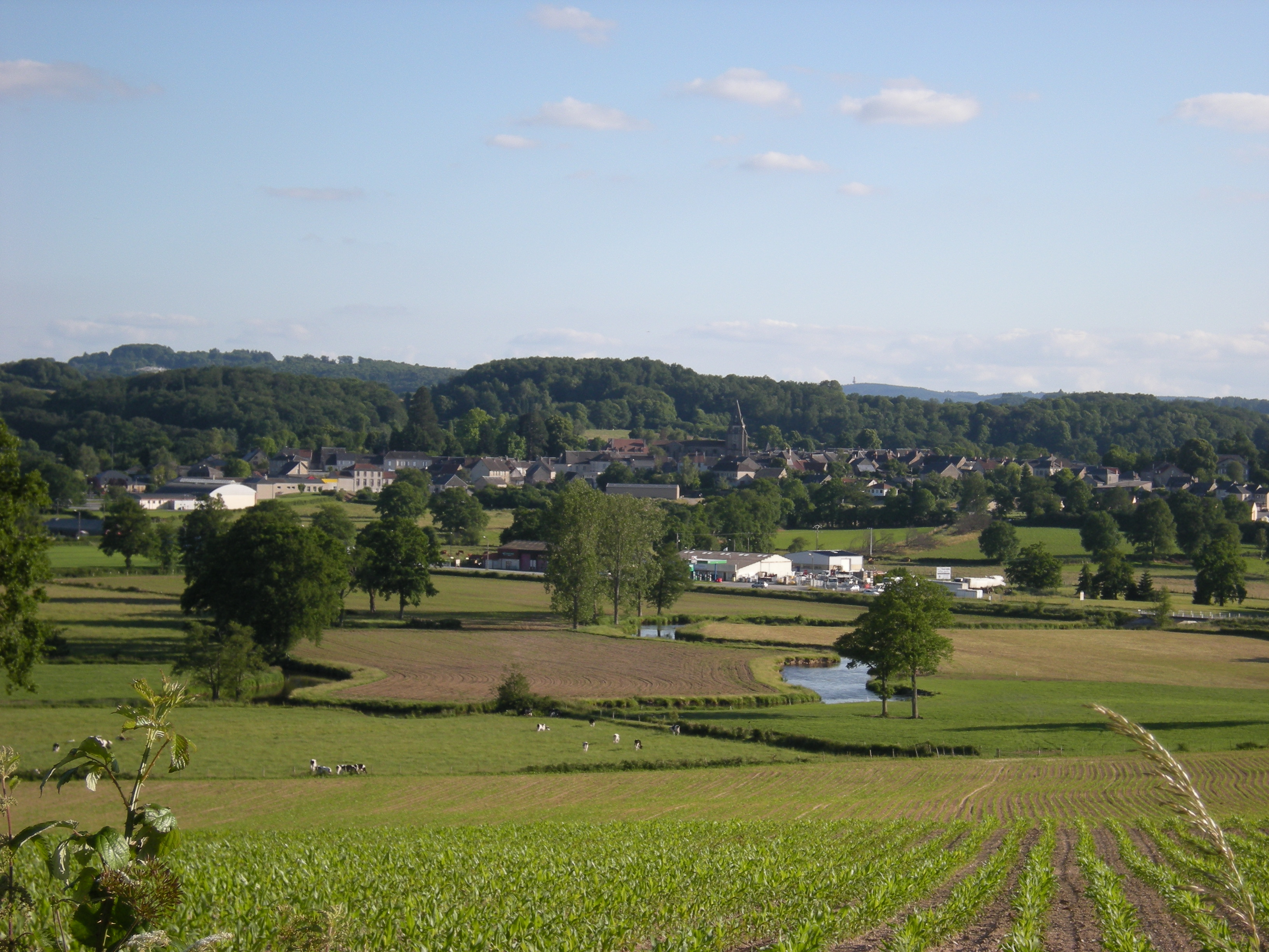 Le bourg du Grand-Bourg vu depuis le village d'Ardannes. On distingue au premier plan la rivière Gartempe. Au second plan apparaît la zone artisanale, et plus loin le bourg regroupé autour de la collégiale Notre-Dame.